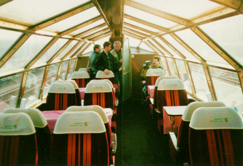 Innenraum eines Aussichtswagens des reisebüro mittelthurgau (ehemals Deutsche Bundesbahn, Rheingold)